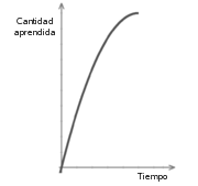 Curva de aprendizaje